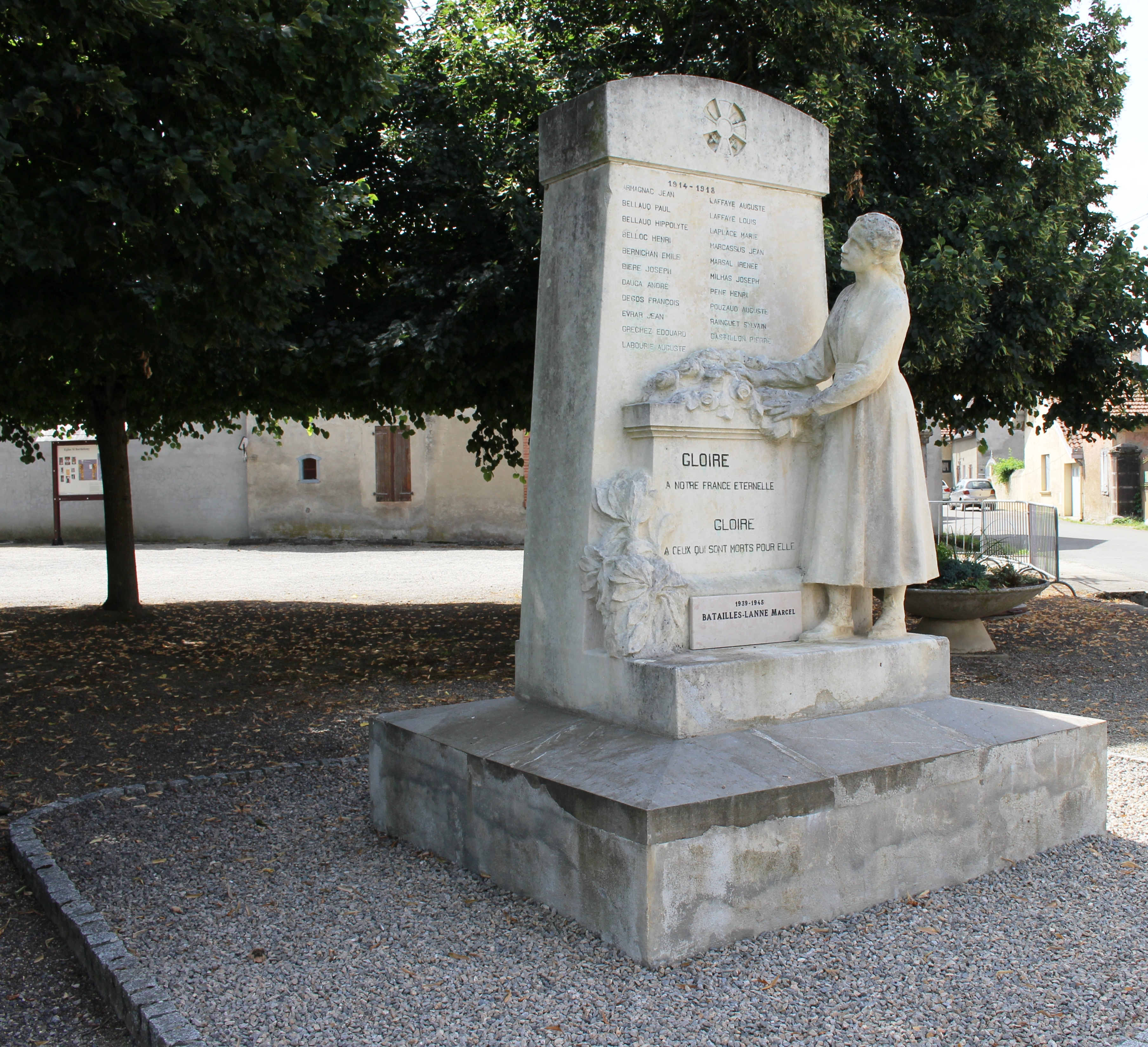 Monument aux morts d'Andrest (Hautes-Pyrénées)